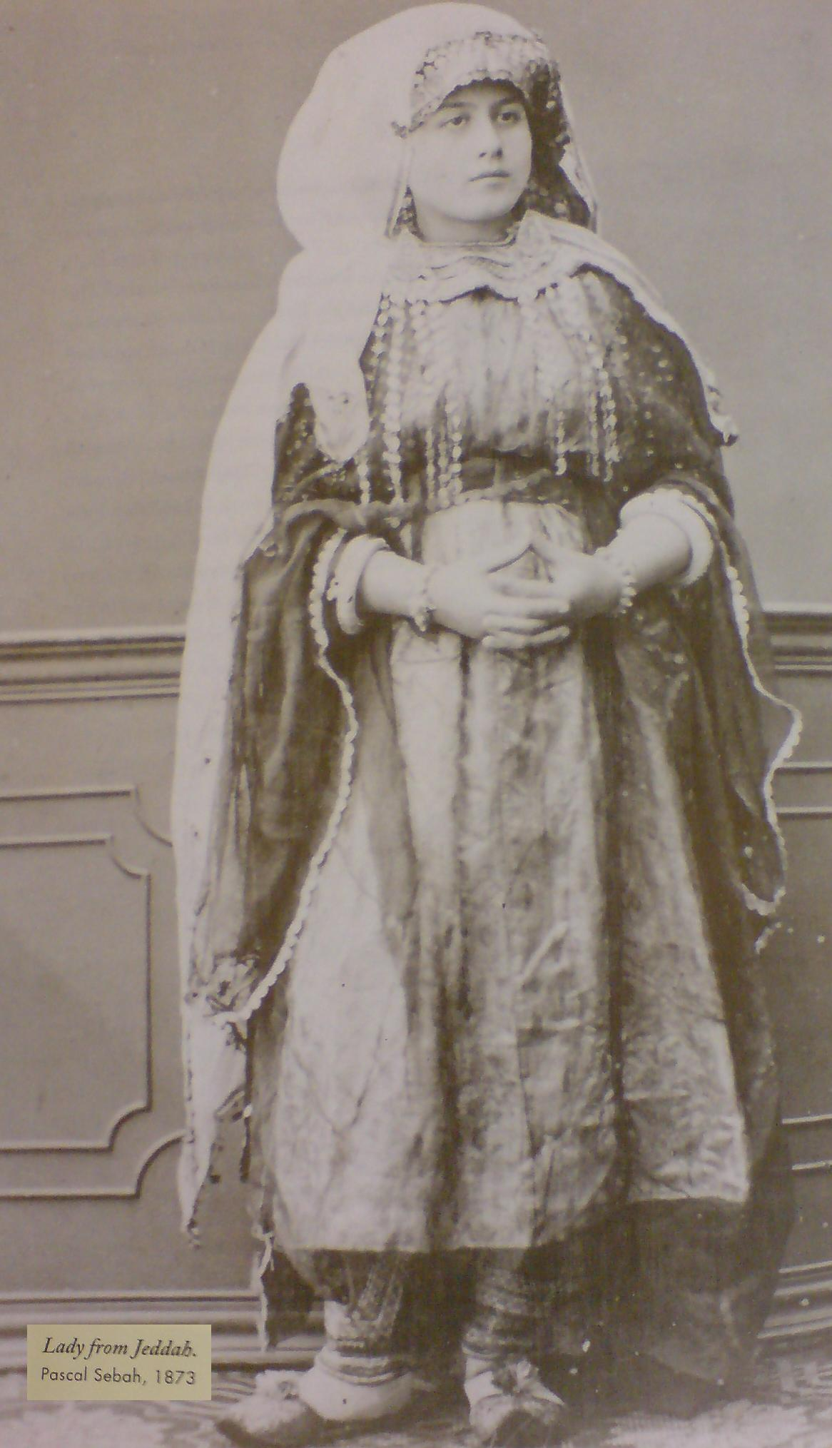 A Lady from Jeddah .